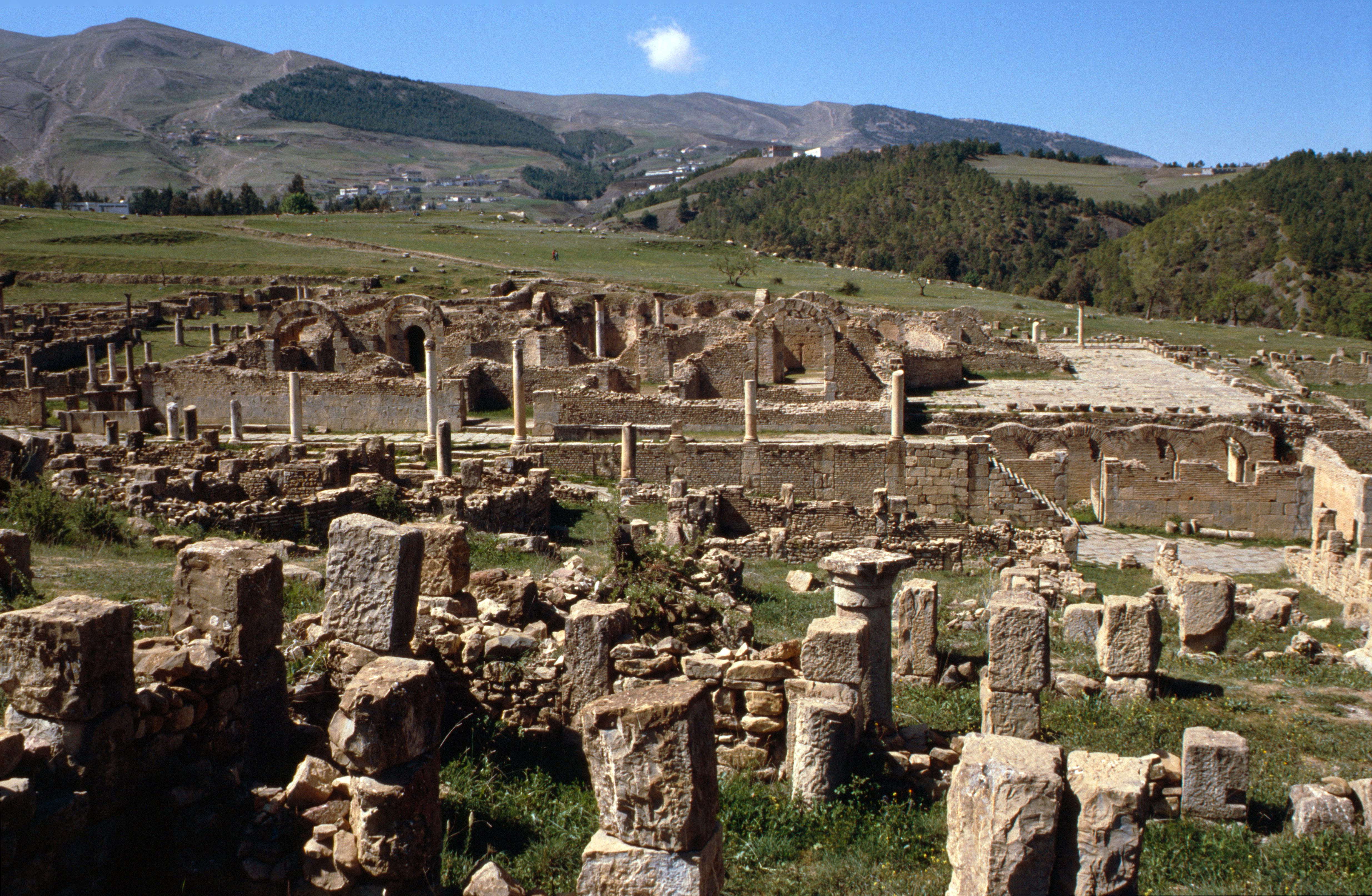 Die römischen Thermen 1990